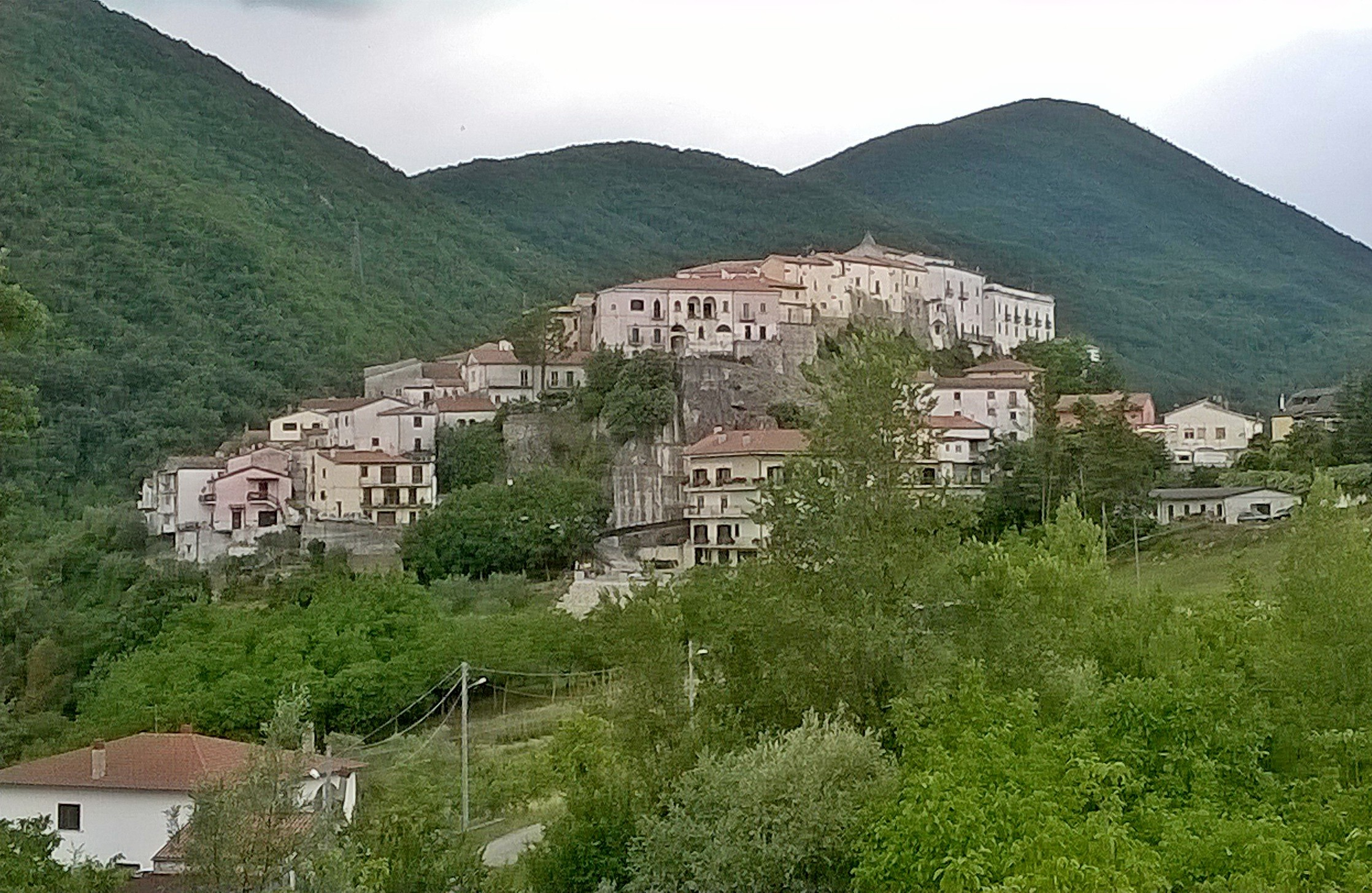 L'Acropoli di Colli a Volturno